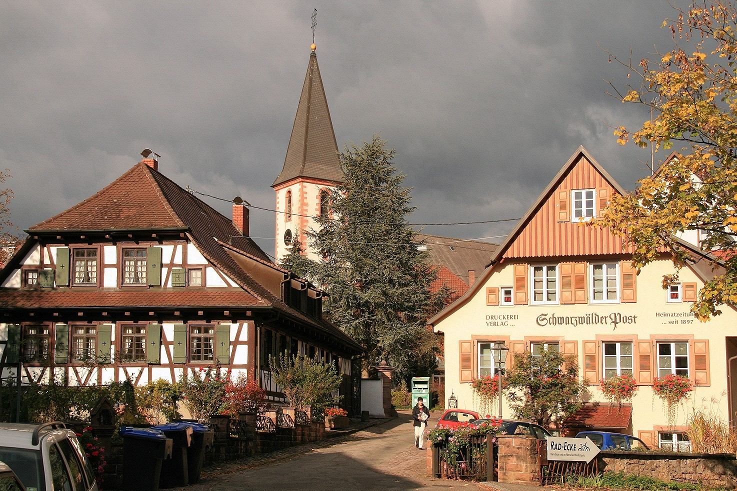 Pfarrhofgraben mit Stadtkirche